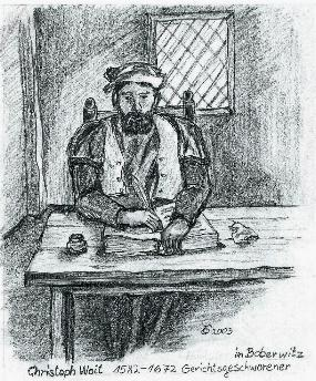 Christoph Woit war ein Kretschmar in Boberwitz in Niederschlesien. Die Woits besaßen eine Kretschmarstelle (Dorfkrug) bis 1945 in Petersdorf bei Sprottau.